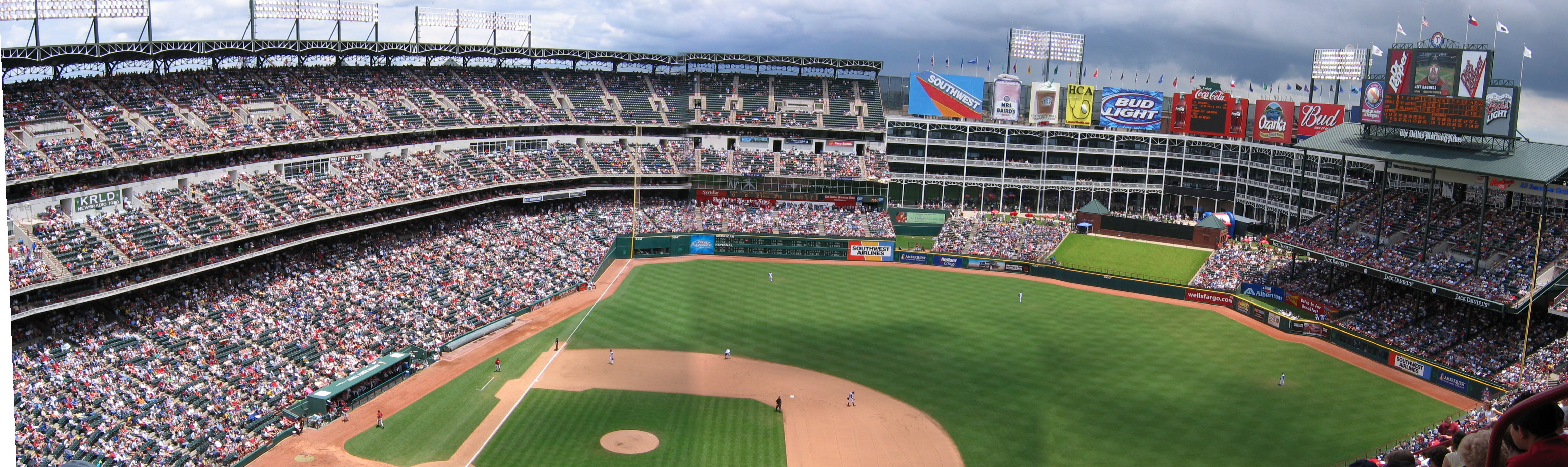 Ameriquest Field in Arlington